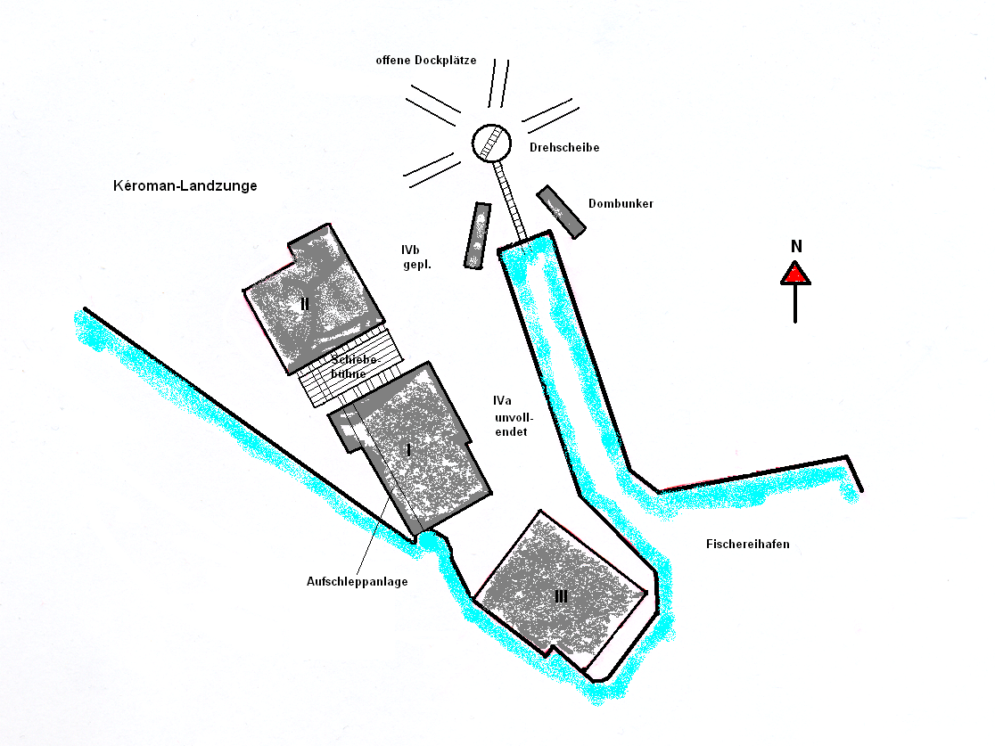 Unmaßstäbliche Skizze der Bunkeranlagen auf der Landzunge Kéroman in Lorient